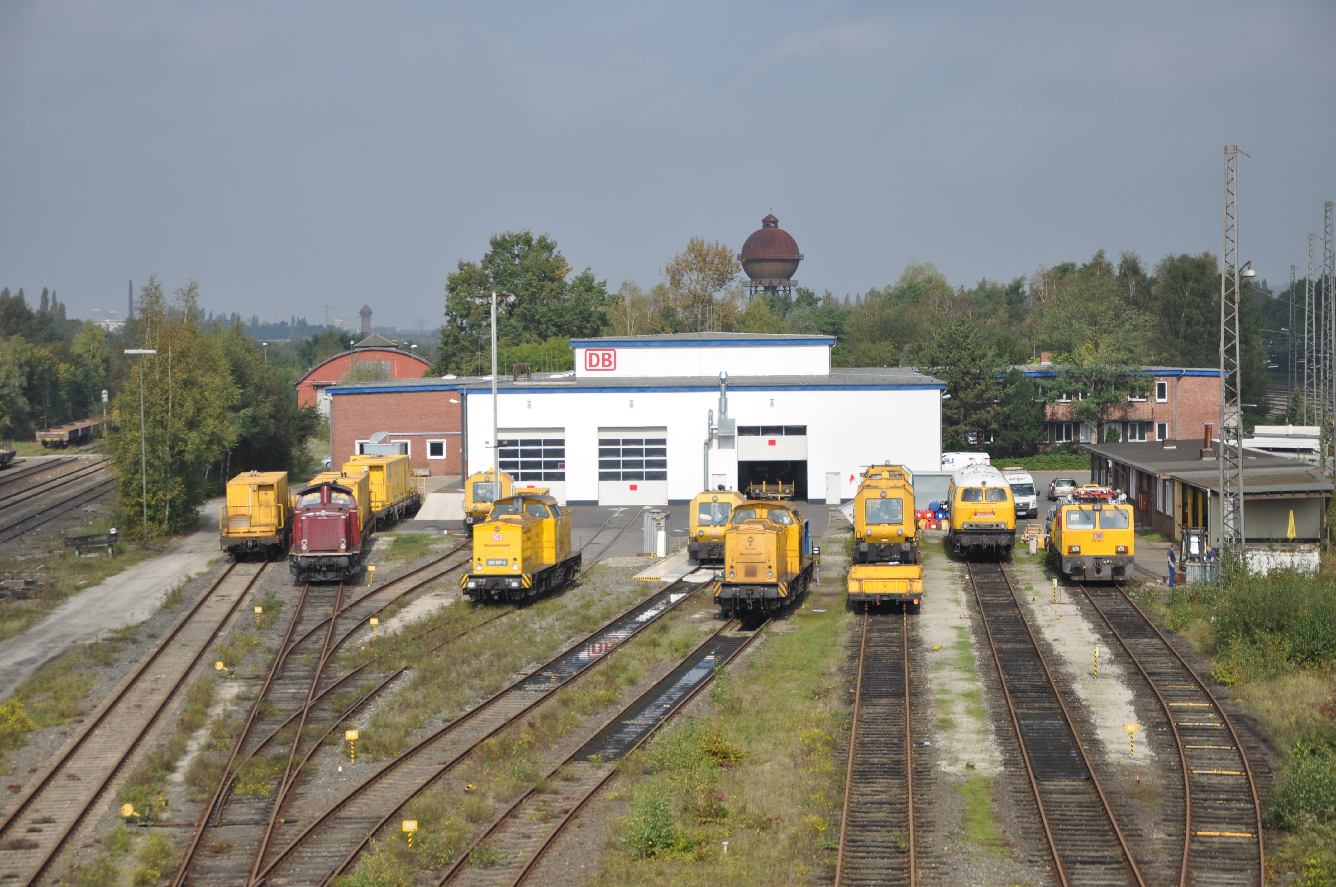 Diverse Bahndienstfahrzeuge stehen in Duisburg-Entenfang abgestellt.